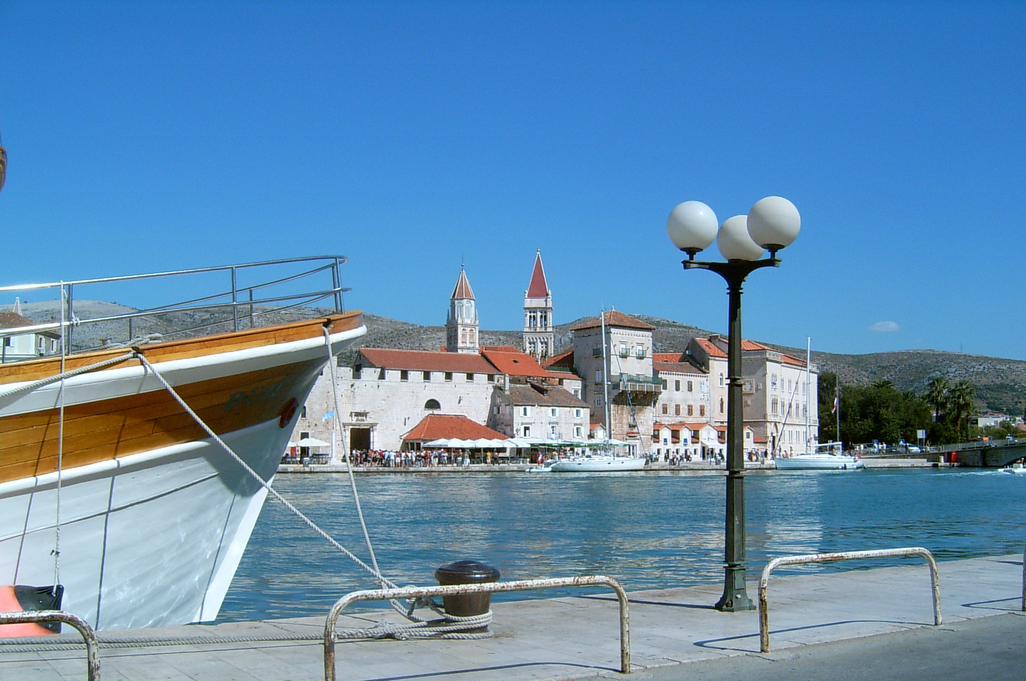 Chorwacja, Gornij Okrog na Ciovo